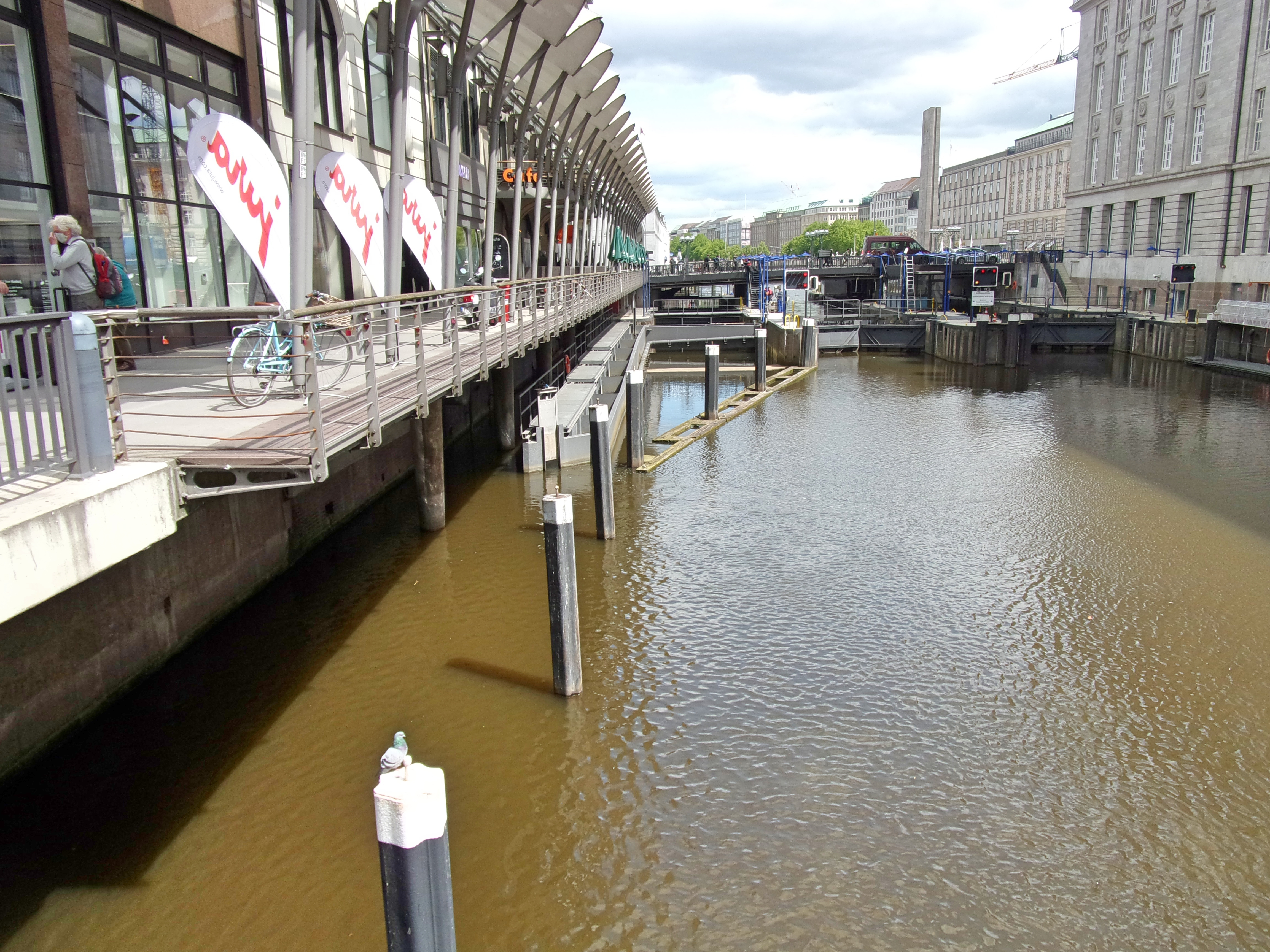 Die Fisch-Passage Rathausschleuse im Alsterfleet in Hamburg-Neustadt befindet sich unterhalb der der Alsterarkaden (links) und besteht aus insgesamt 17 Becken mit 4,20 Metern Länge und 88 cm Breite. Der Höhenunterschied beträgt insgesamt 1,70 Meter. Bau der Anlage 2015.